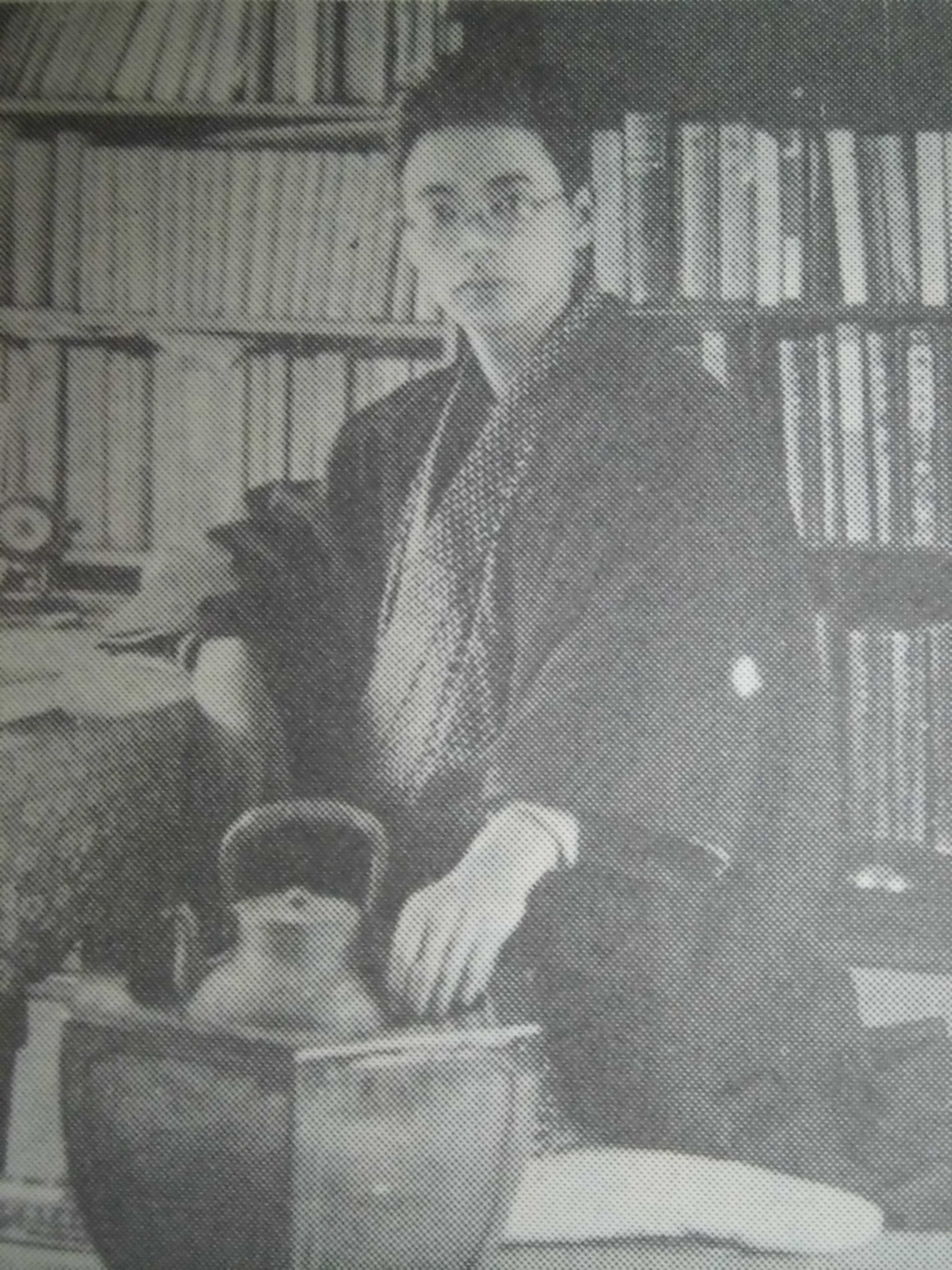 奥村 綱雄（Okumura Tsunao）